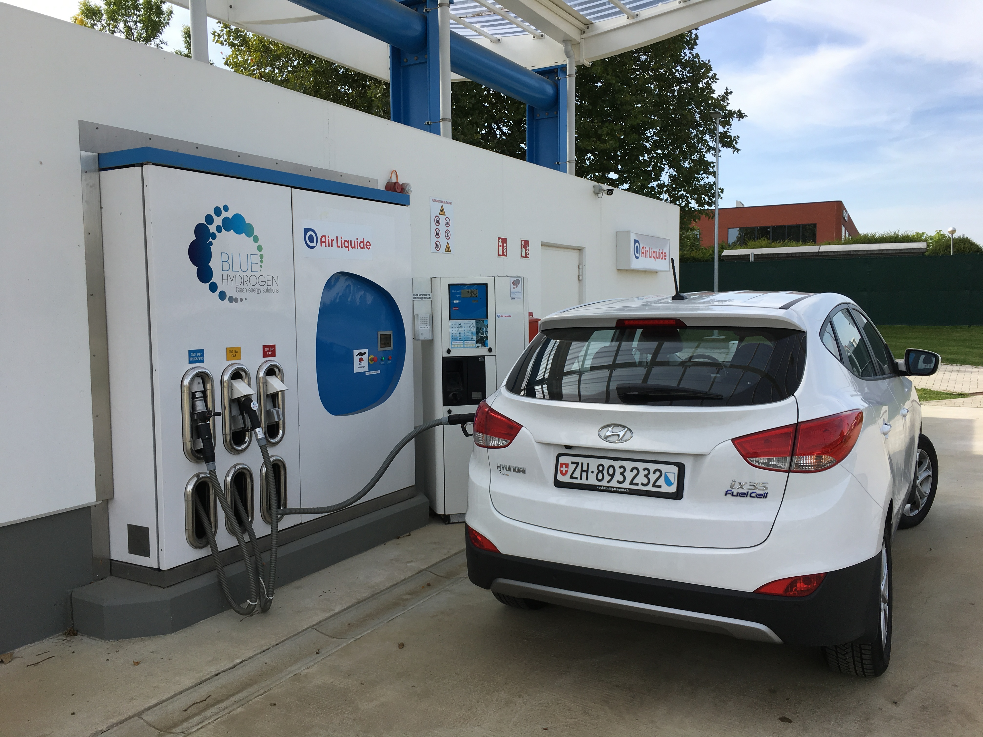 Air Liquide 700 bar Wasserstofftankstelle in Zaventem Belgien